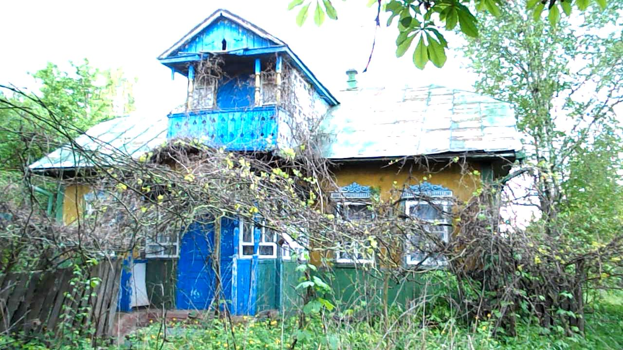 у Пашківці